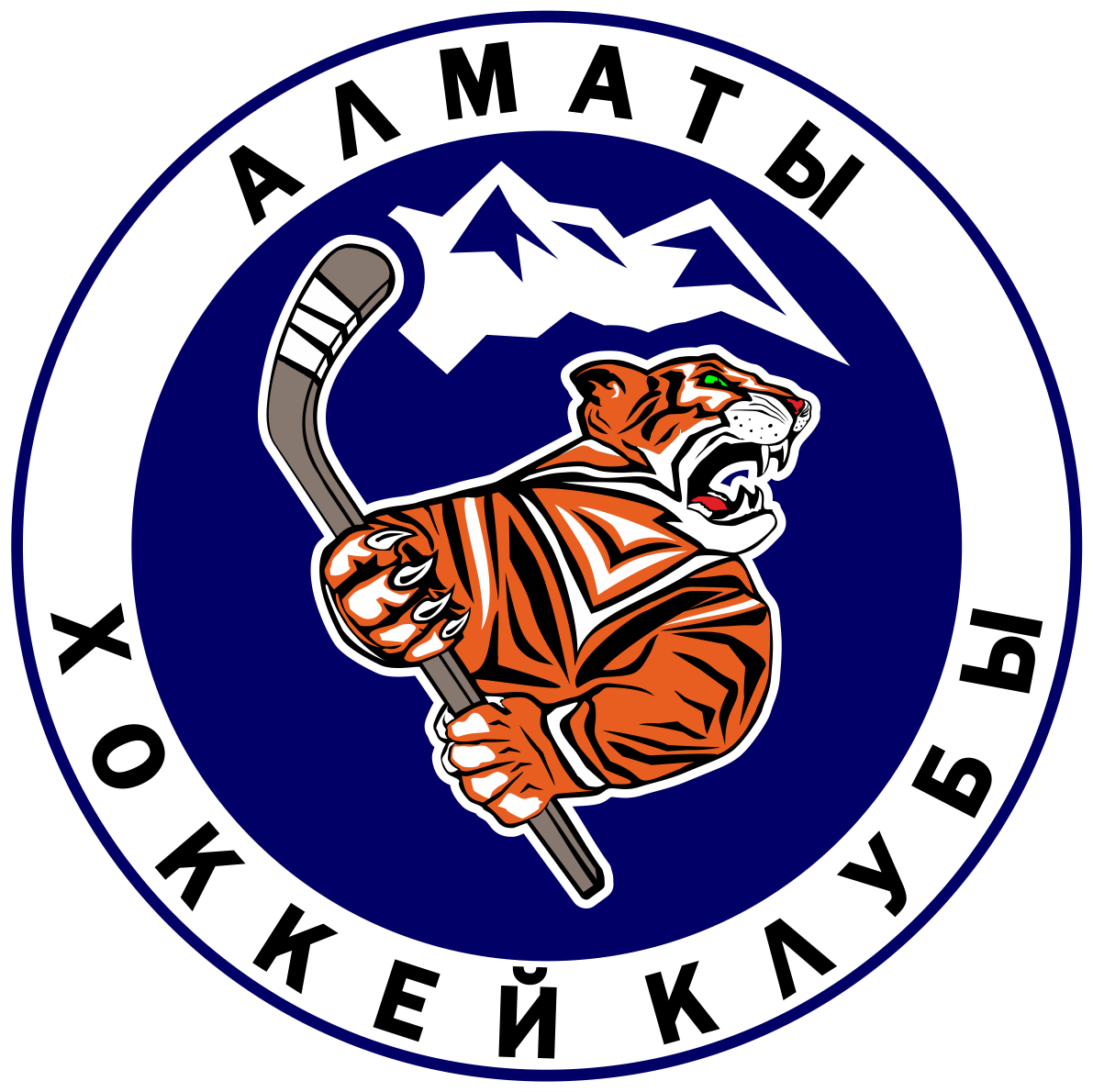 Логотип хоккейного клуба "АЛМАТЫ"